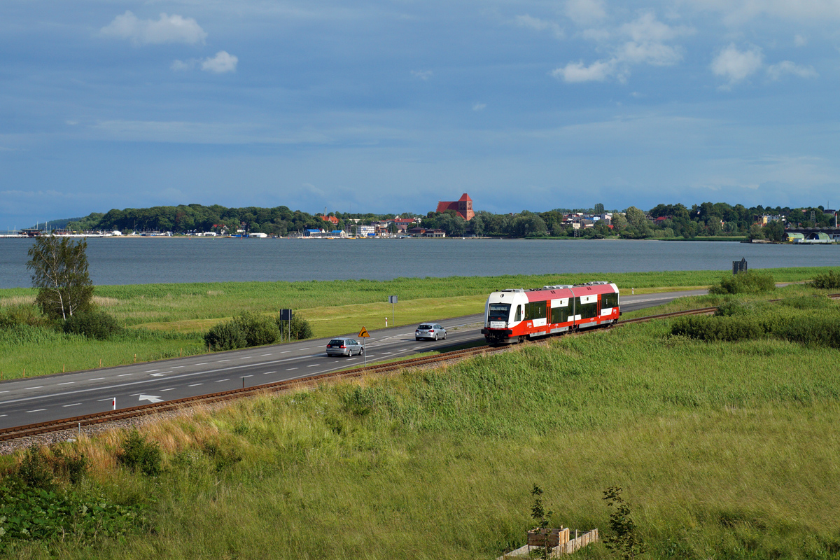 Pesa SA133-021 na tle Zatoki Puckiej